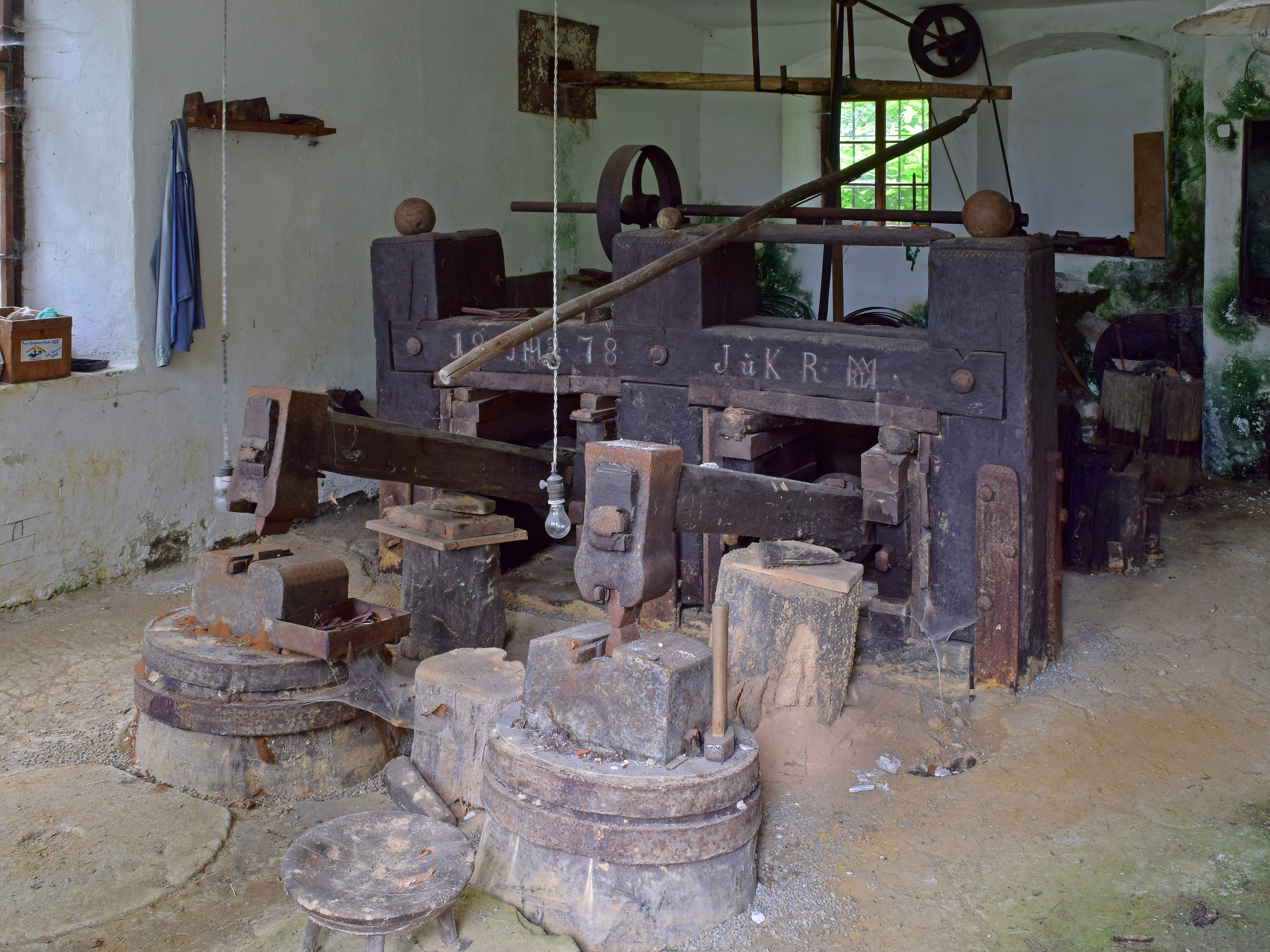 Der Rameishammer wurde 1878 errichtet. Darin befindet sich u.a. ein Doppelschwanzhammer, der durch ein oberschlächtiges Wasserrad betrieben wird.